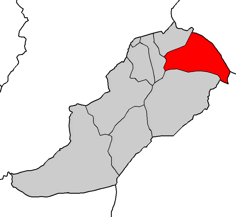 Situación da parroquia de Carballido no concello de Alfoz